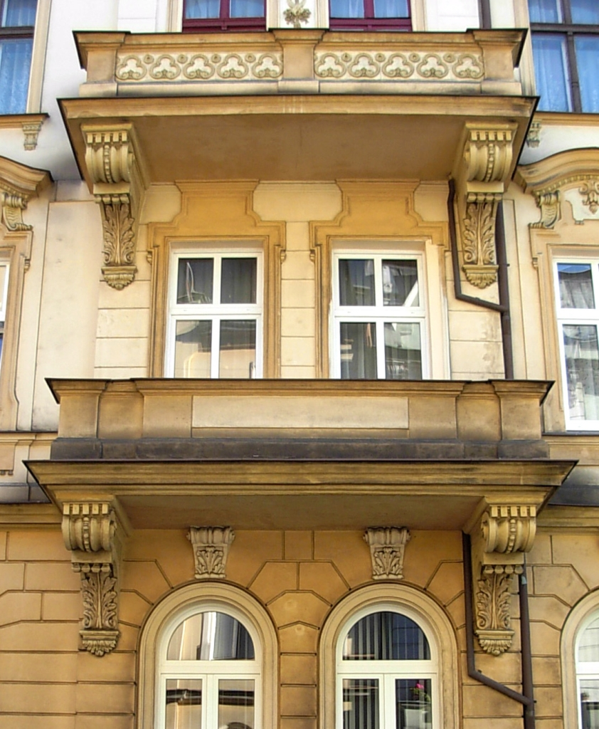 Zabytkowa kamienica przy ul. Cieszkowskiego 17 w Bydgoszczy